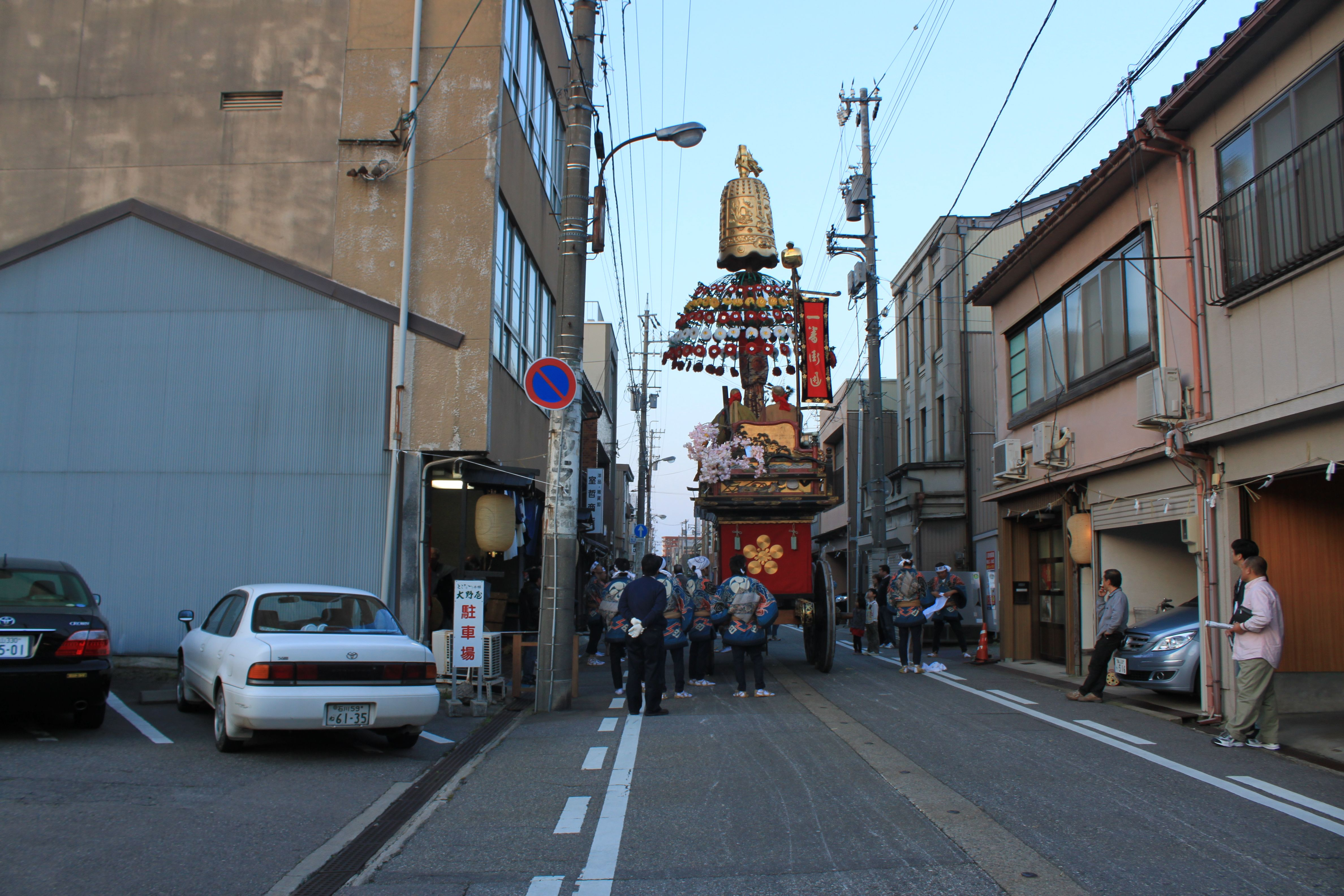 高岡市街の風景